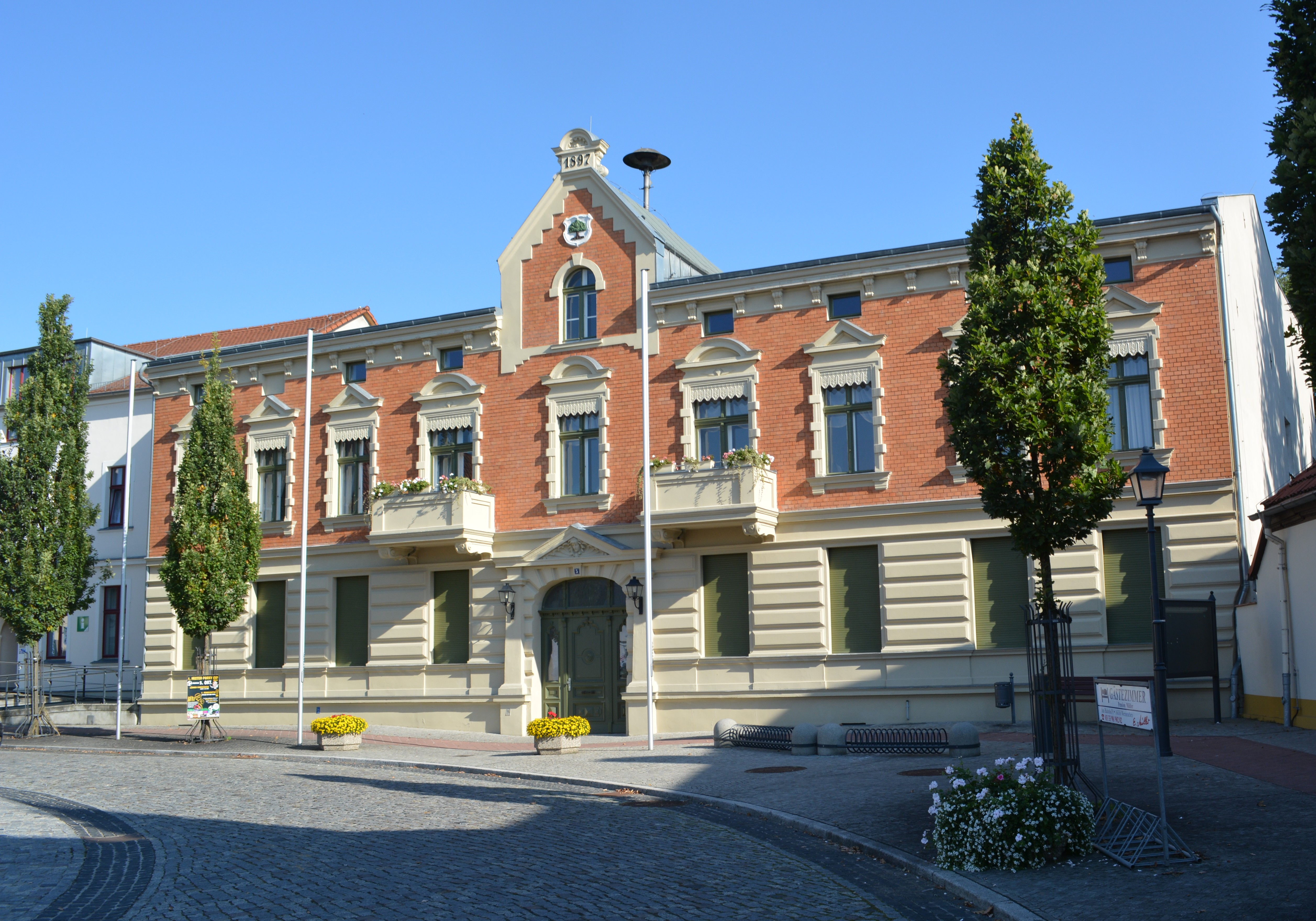 Rathaus, Teil des Ensembles am Marktplatz, erbaut 1897 und steht unter Denkmalschutz